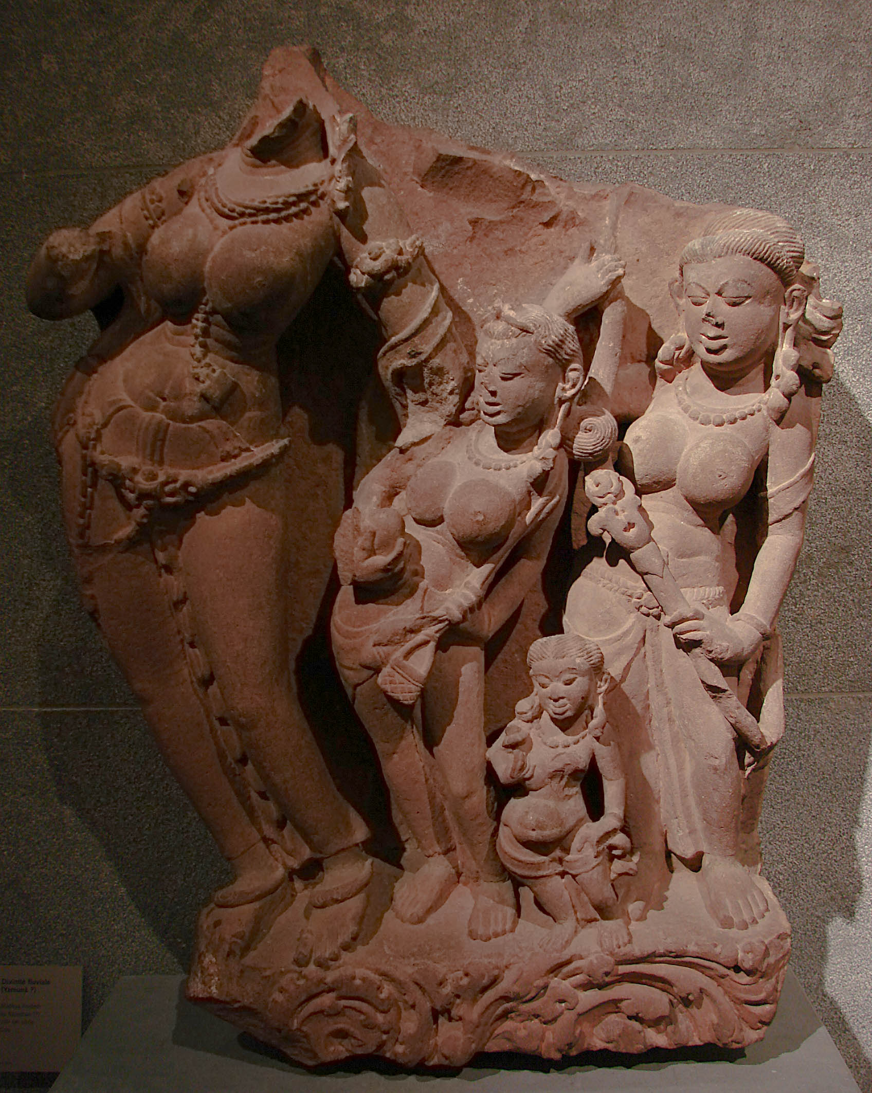 Divinité fluviale (Yamuna), Inde, Madhya Pradesh ou Rajasthan, 8ème-9ème siècle, Grès. Musée Guimet, Paris.